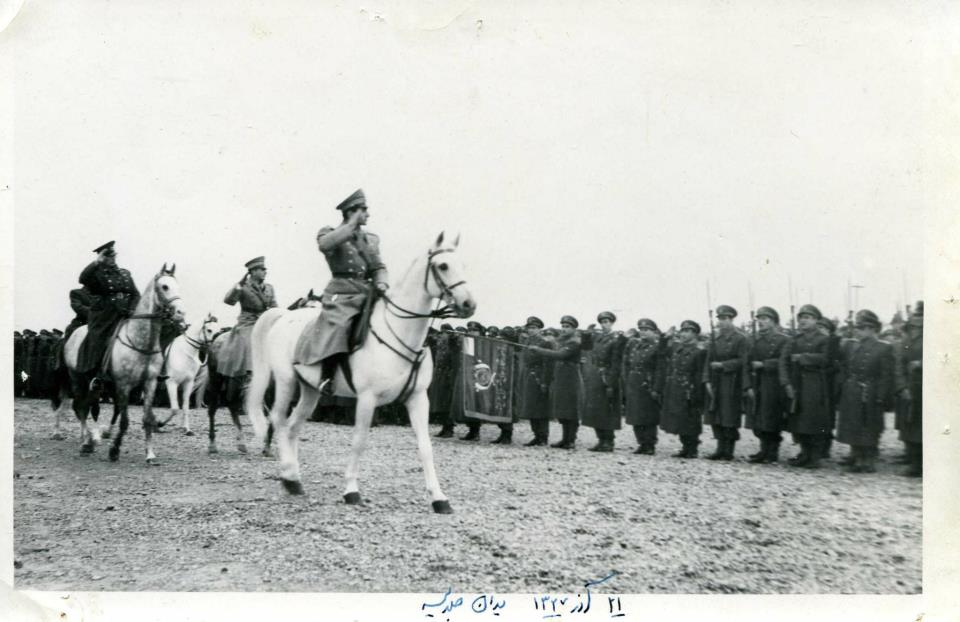 محمد رضا پهلوی در پارک فرح (لاله کنونی) Mohammad Reza Pahlavi - Farah Park - 11th December 1948